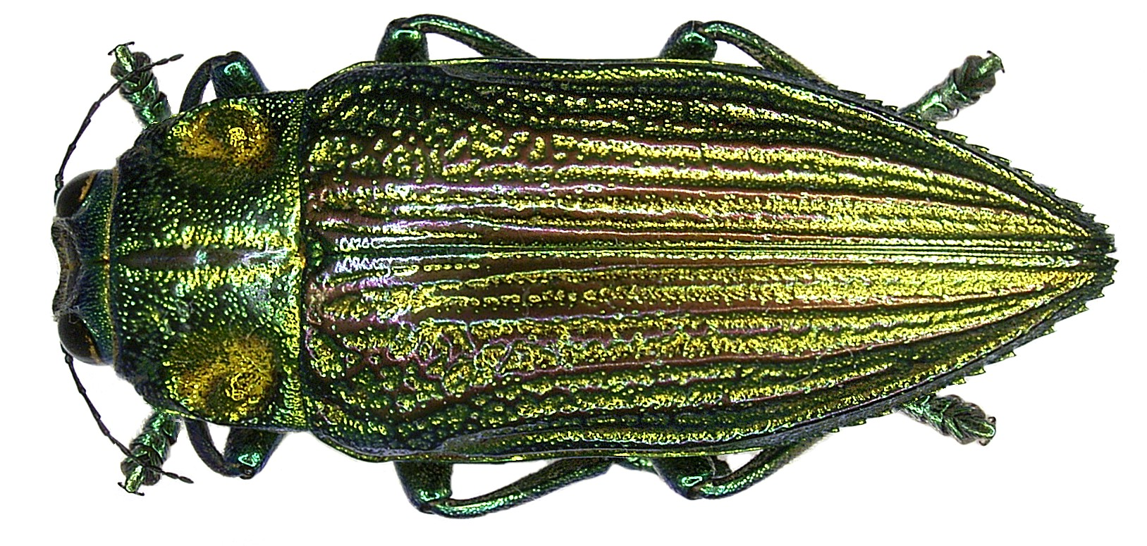 Familie: Buprestidae Groesse: 30 mm Fundort: Indonesien, Batanta Isl., Waywesar leg. A.Skale, 2004; det. Niehuis Photo: U.Schmidt, 2006